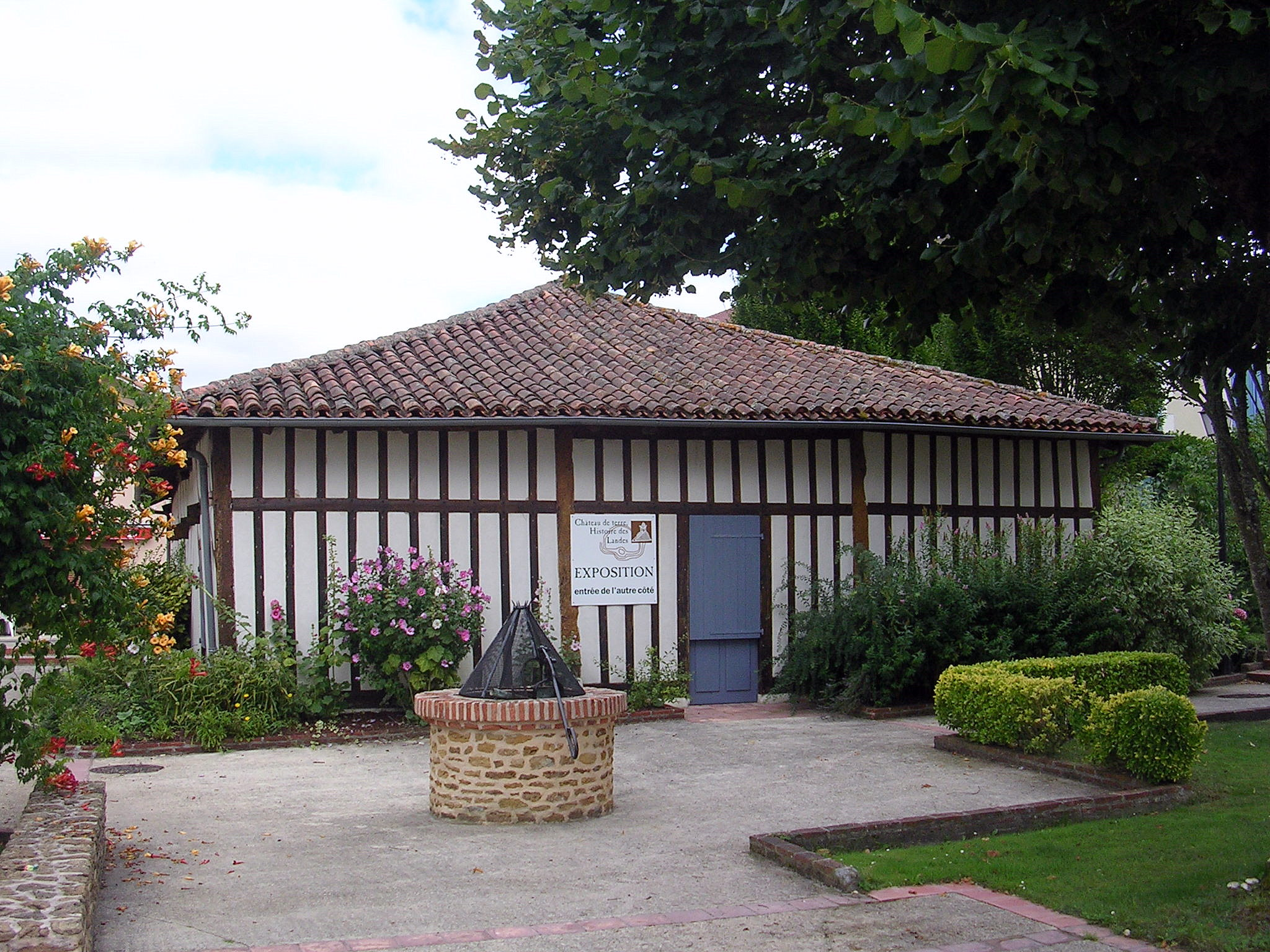 Maison Landaise à Labrit (Landes, France)